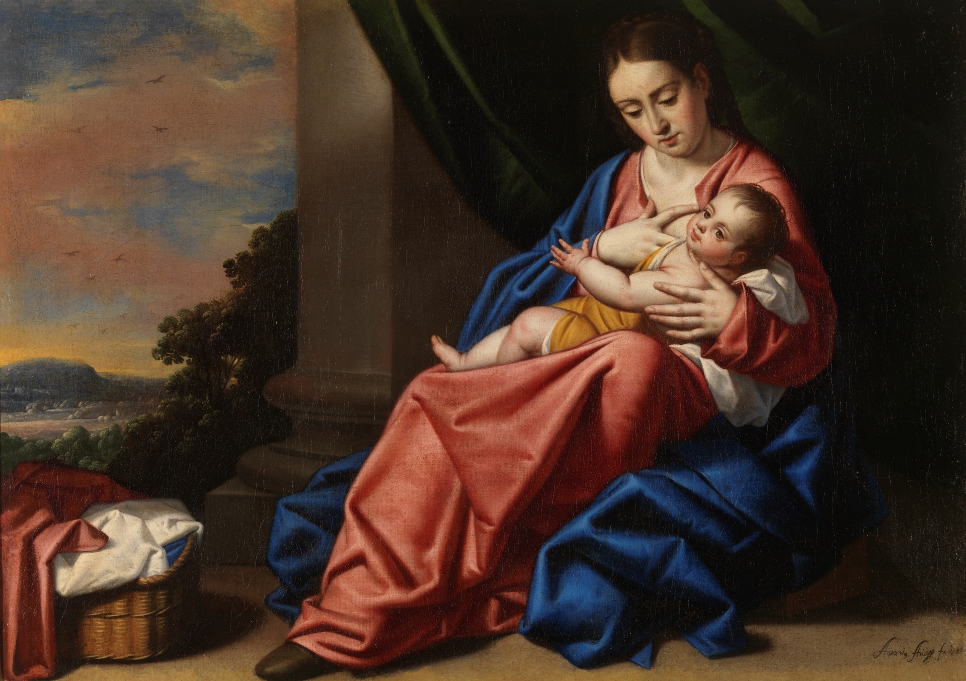 La obra representa a la Virgen María llevando en brazos a su hijo, el Niño Jesús.